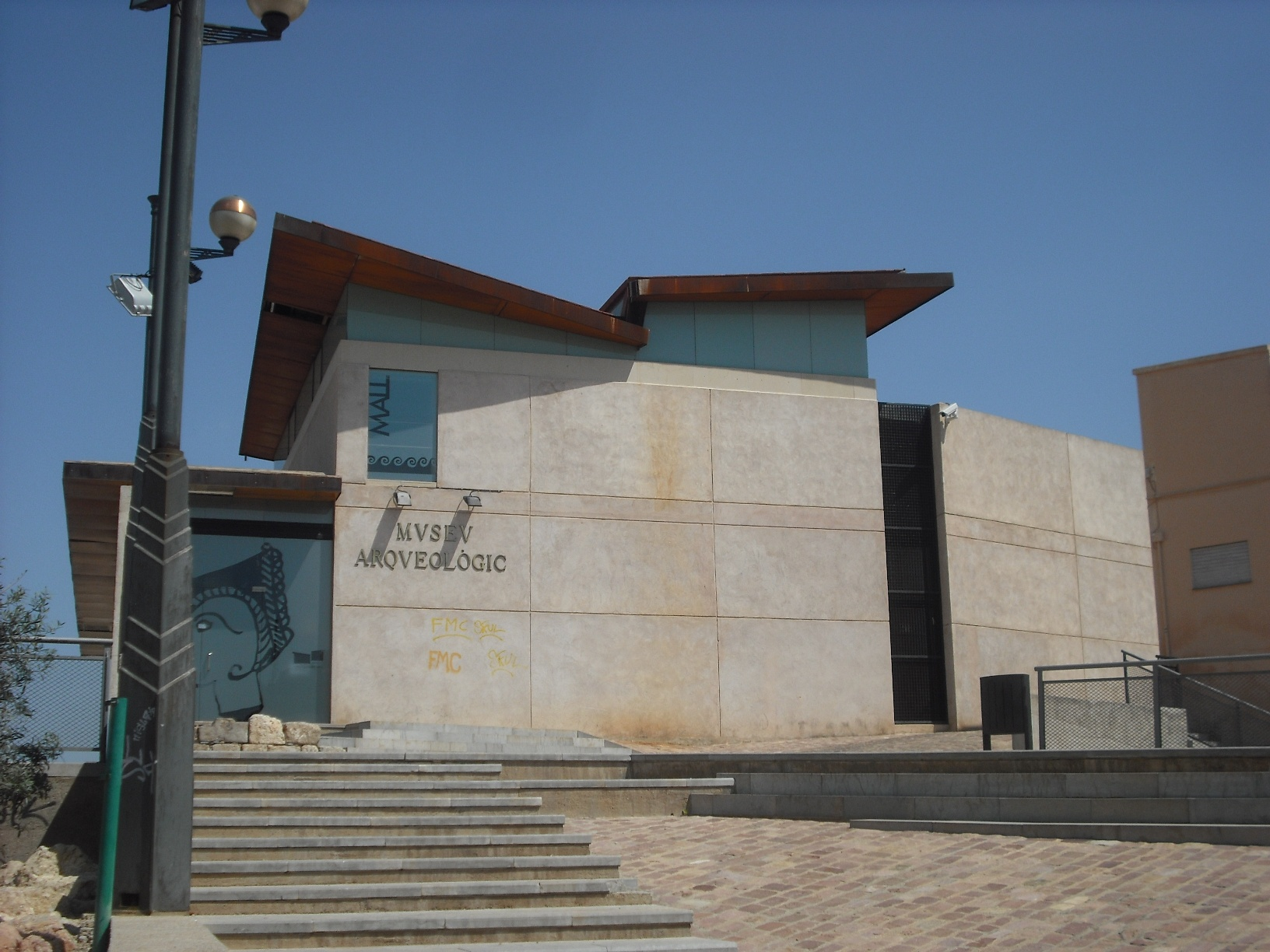 Portada del MALL (Museu Arqueològic de Llíria).